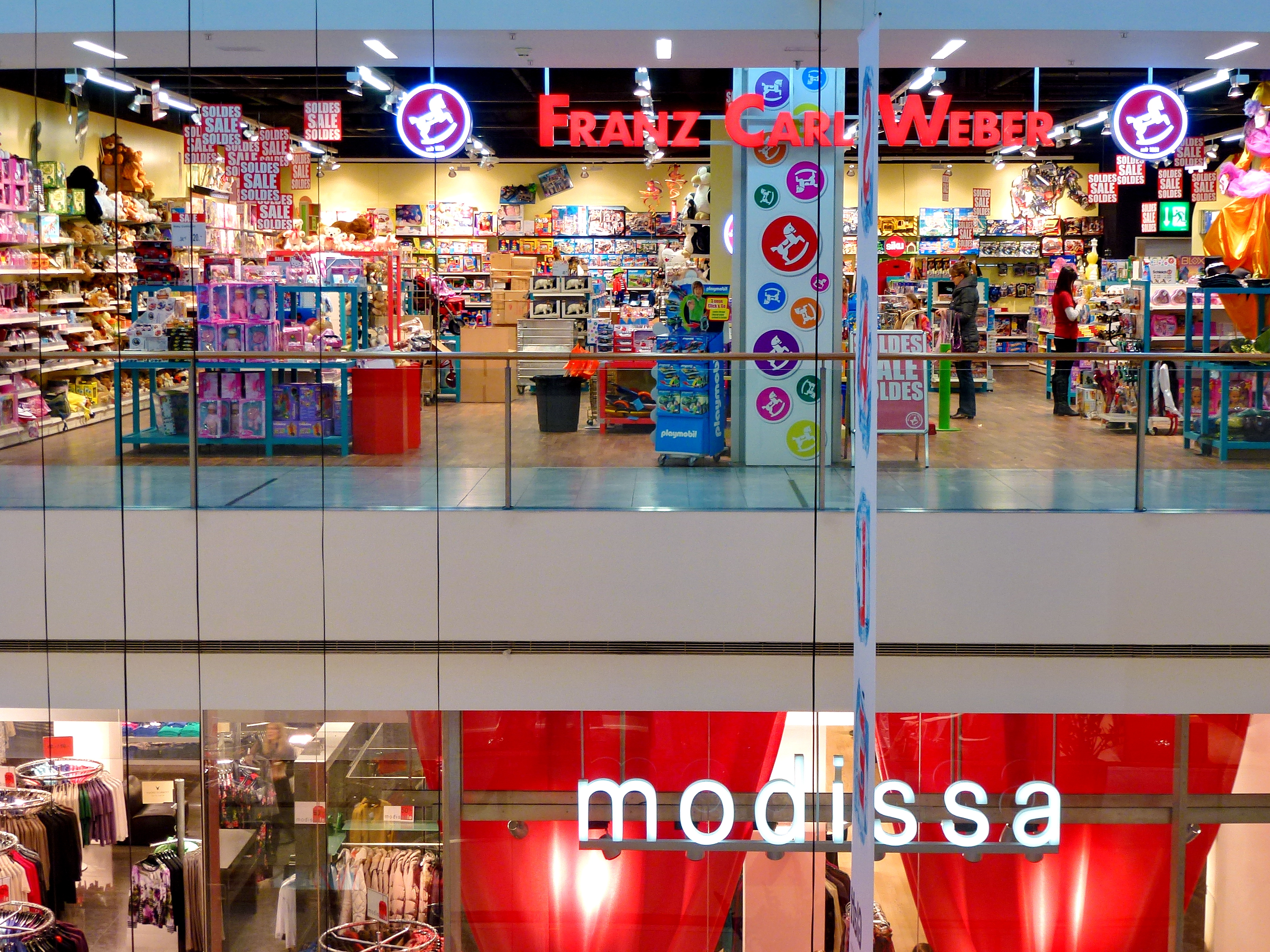 Glattzentrum in Wallisellen (Switzerland)